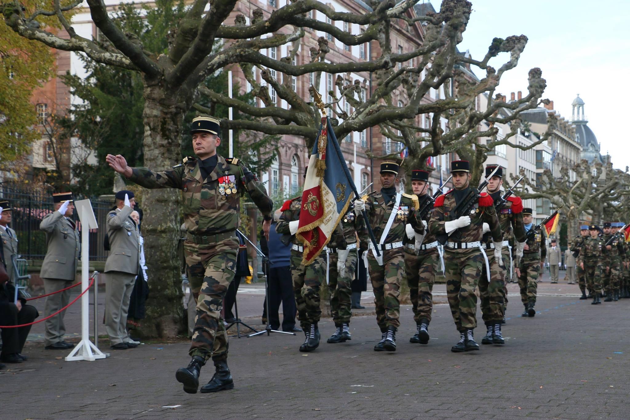 Drapeau du 13e régiment du génie au 72e anniversaire de la libération de Strasbourg. En tête le colonel LENOBLE, commandant le 13e régiment du génie. ©RégimentdeMarcheduTchad